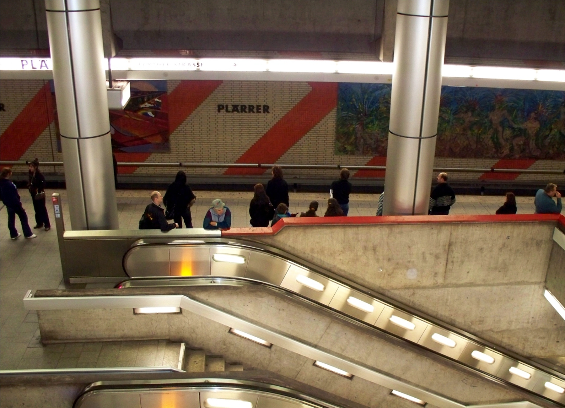 U-Bahnhof Plärrer in Nürnberg. Blick von der Ebene -1 auf die Ebene -2.